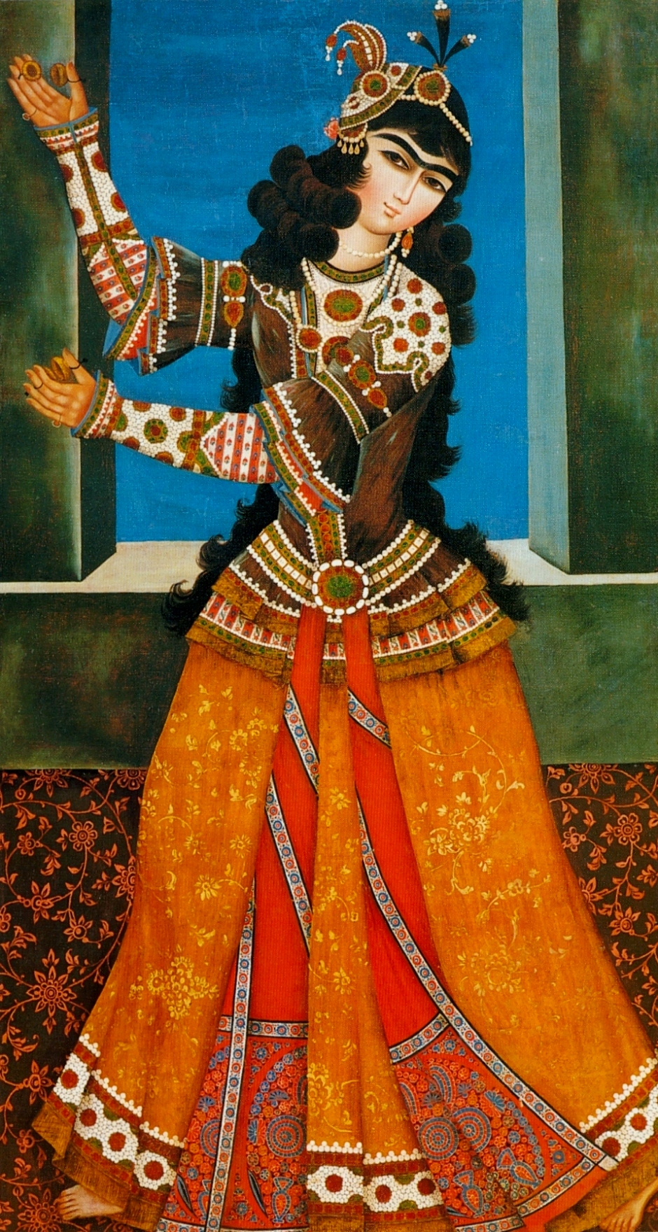 Dancing_girl_with_castanets_1я_четв._19в__Эрмитаж.